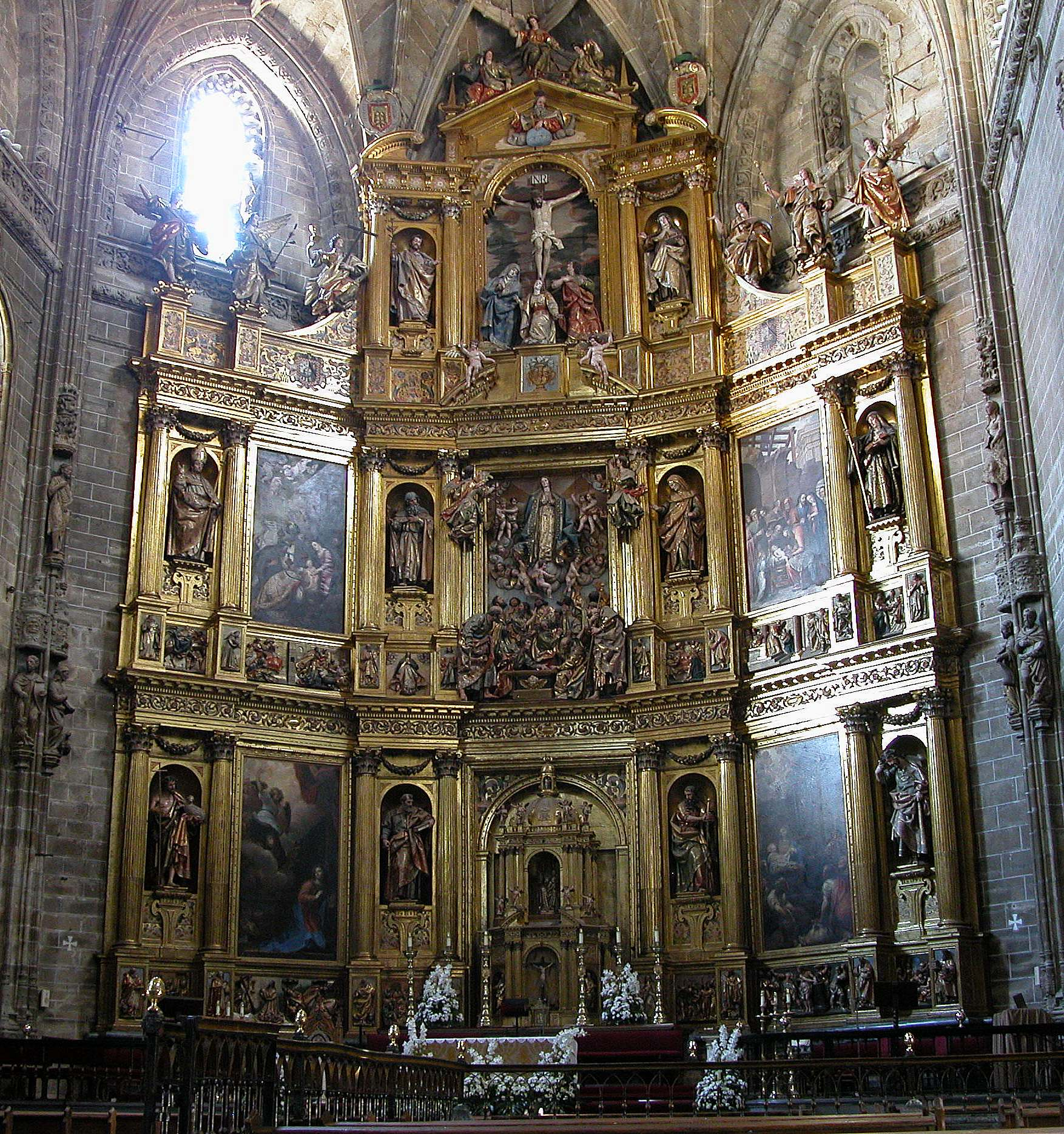 Retablo de la catedral nueva de Plasencia